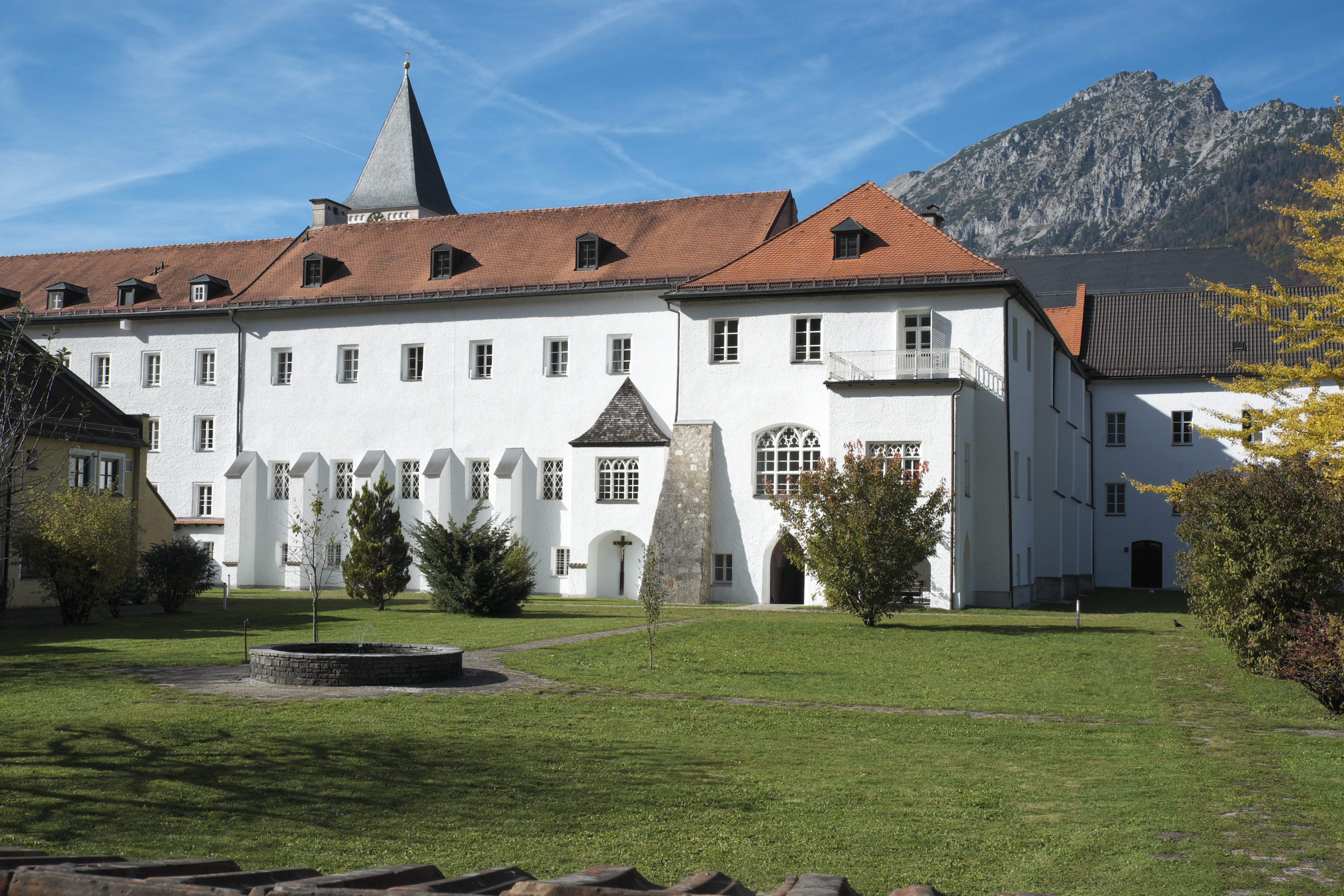 Ehemaliges Augustiner-Chorherrenstift St. Zeno in Bad Reichenhall im Landkreis Berchtesgadener Land (Bayern/Deutschland)